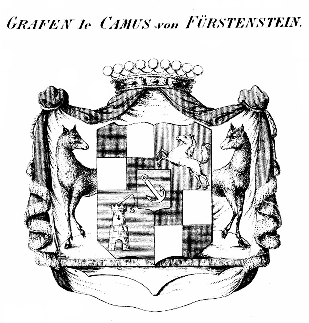 Wappen Camus Le Camus von Fürstenstein - Tyroff HA.jpg